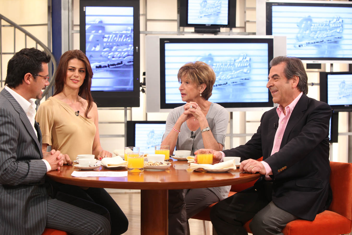 Eduardo Frei Ruiz-Tagle y su esposa Marta Larraechea en una entrevista en el programa Buenos días a todos